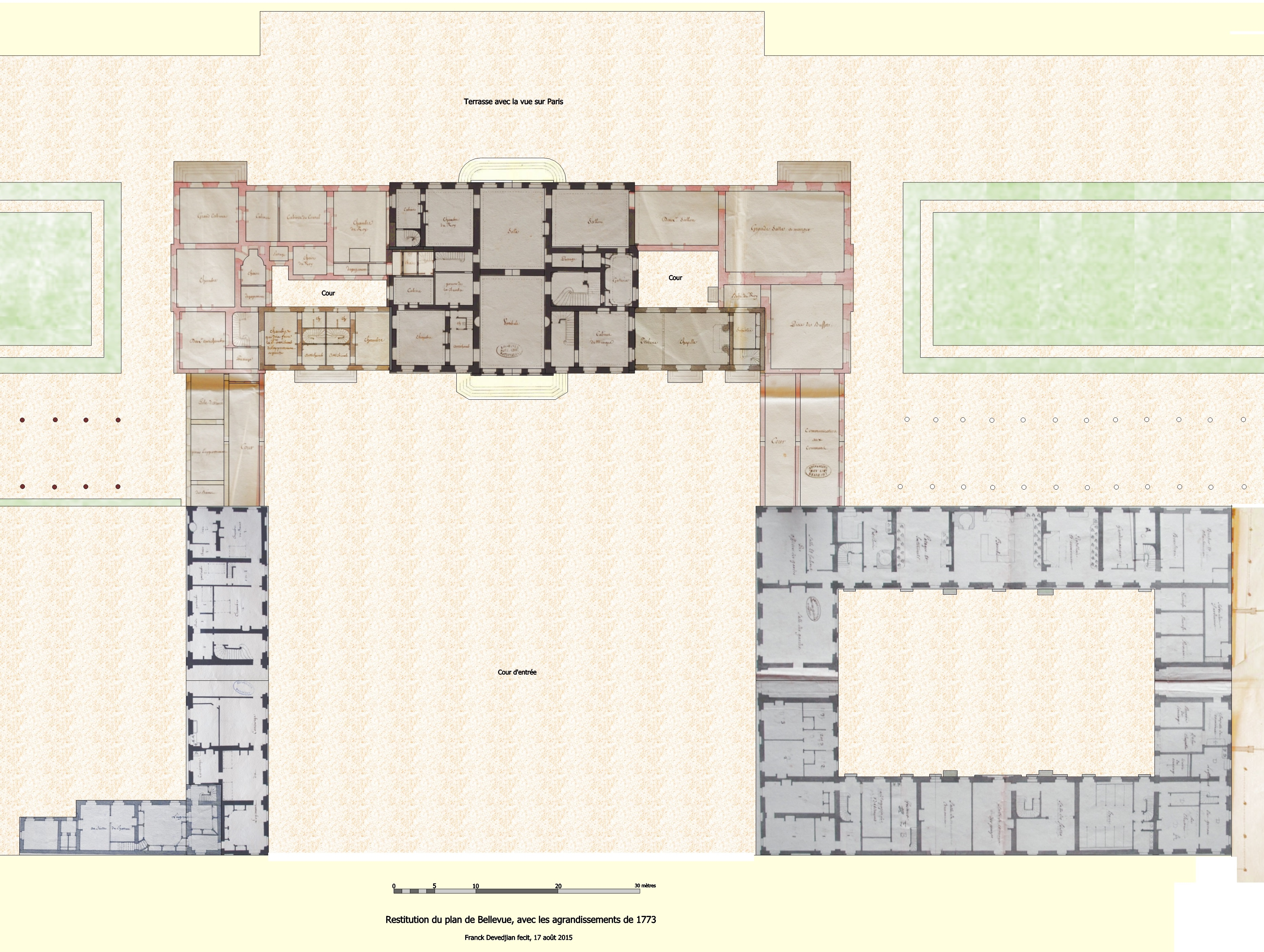 Plan du château de Bellevue, avec les agrandissements de 1773.